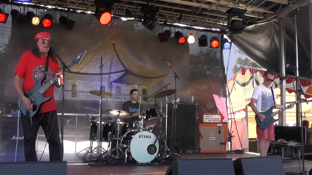 Kon Sameti beim Herzberg Festival 2019